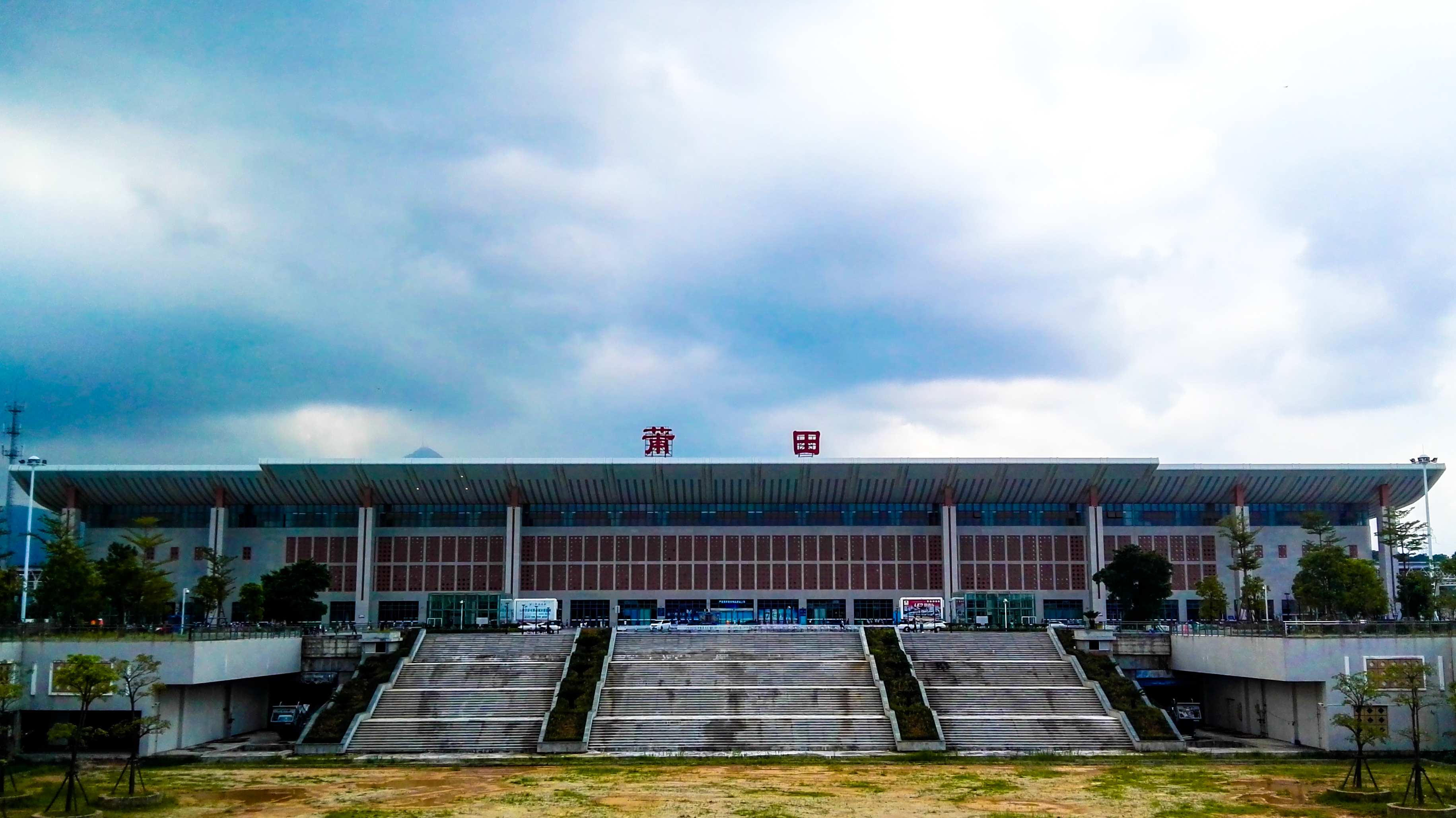 2016年8月的莆田站站房